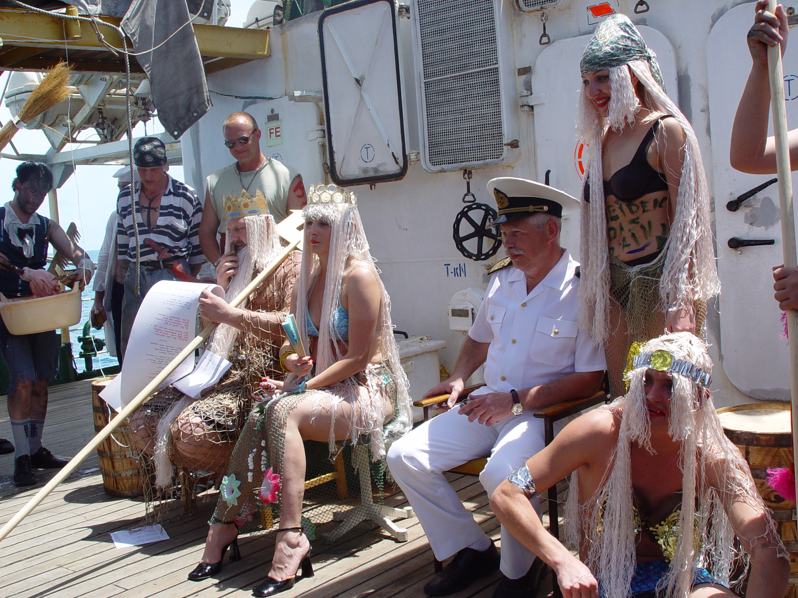 Chrzest równikowy na Nadieżda